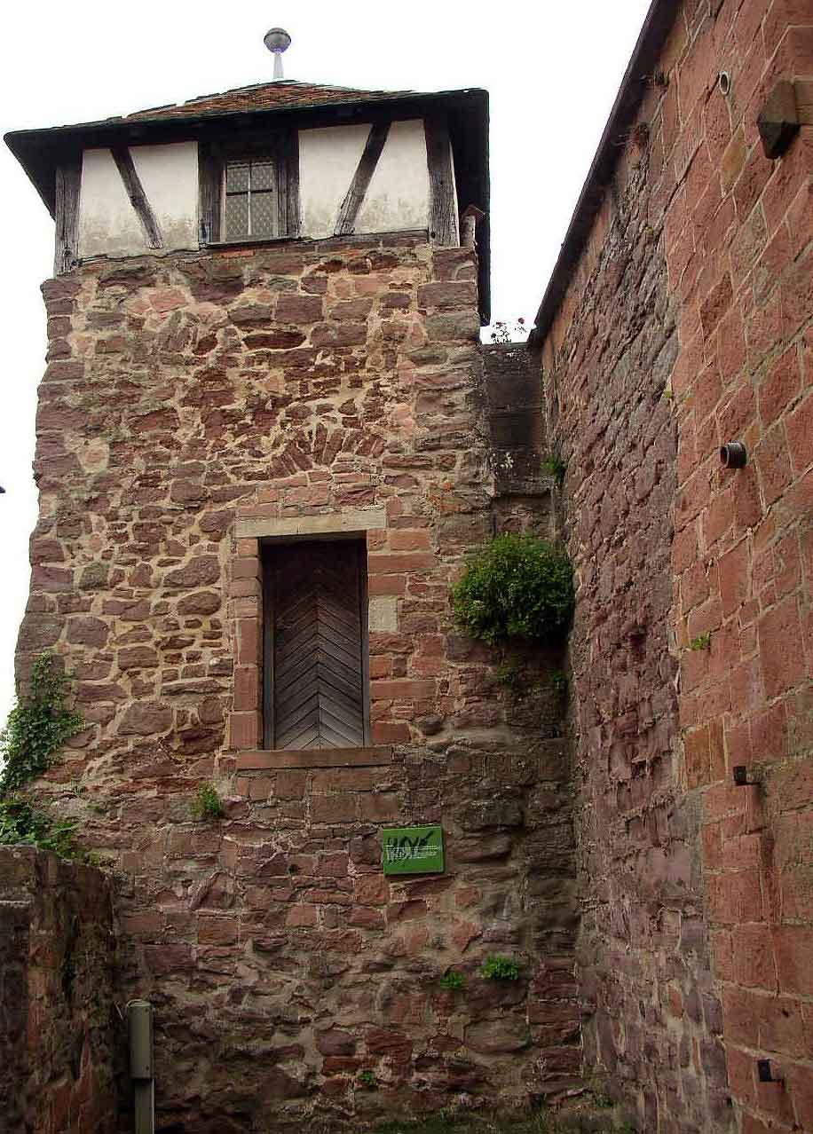 Der Hexenturm in Windecken: Er war Teil der Befestigung der Vorburg. Sein Mauerwerk stammt aus dem 15. Jahrhundert, das Fachwerk ist aus der zweiten Hälfte des 17. Jahrhunderts. Nach volkstümlicher Überlieferung wurden in der Zeit der Hexenverfolgung verdächtige Frauen hier eingekerkert.